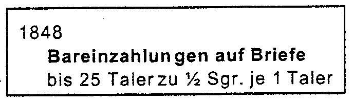 1848 Neuerung in den preußischen Tarifen